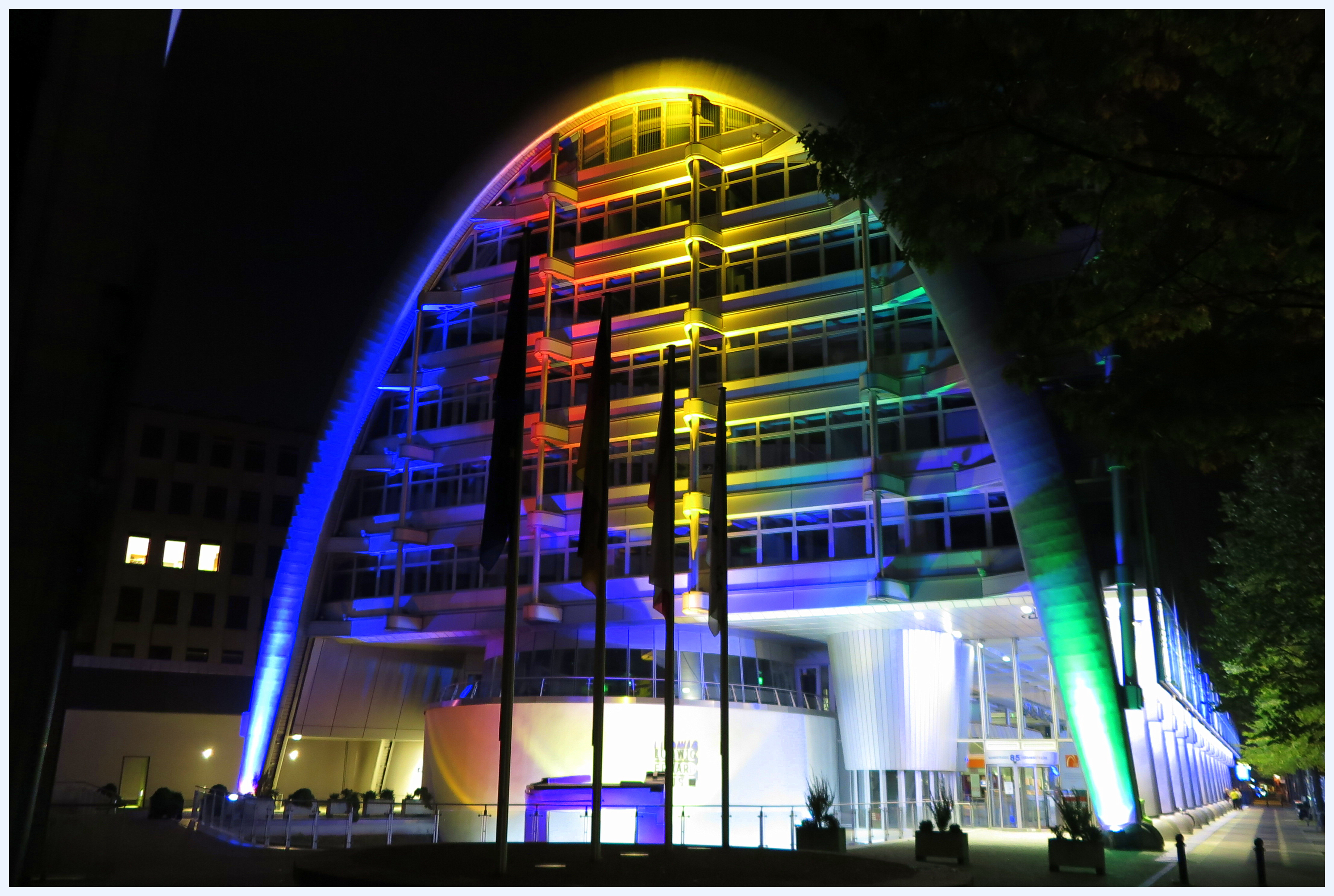 Ludwig-Erhardt-Haus (IHK) Fasanenstraße freehand mit der Funktion "Nachtaufnahme ohne Stativ"